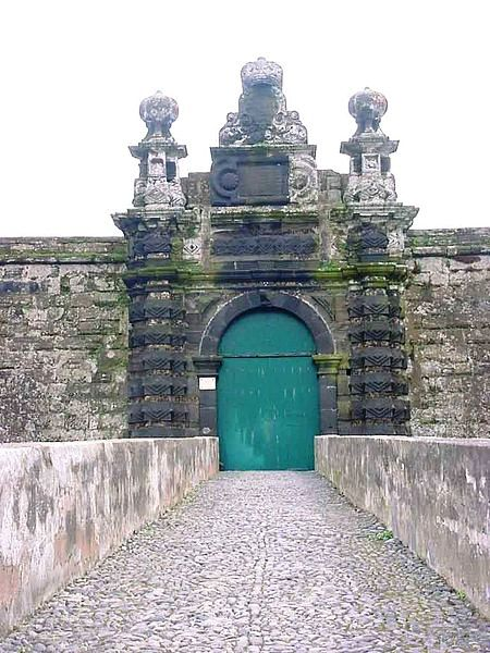 Fortaleza de São João Baptista do Monte Brasil, Angra do Heroísmo, ilha Terceira, Açores: Portão de Armas.